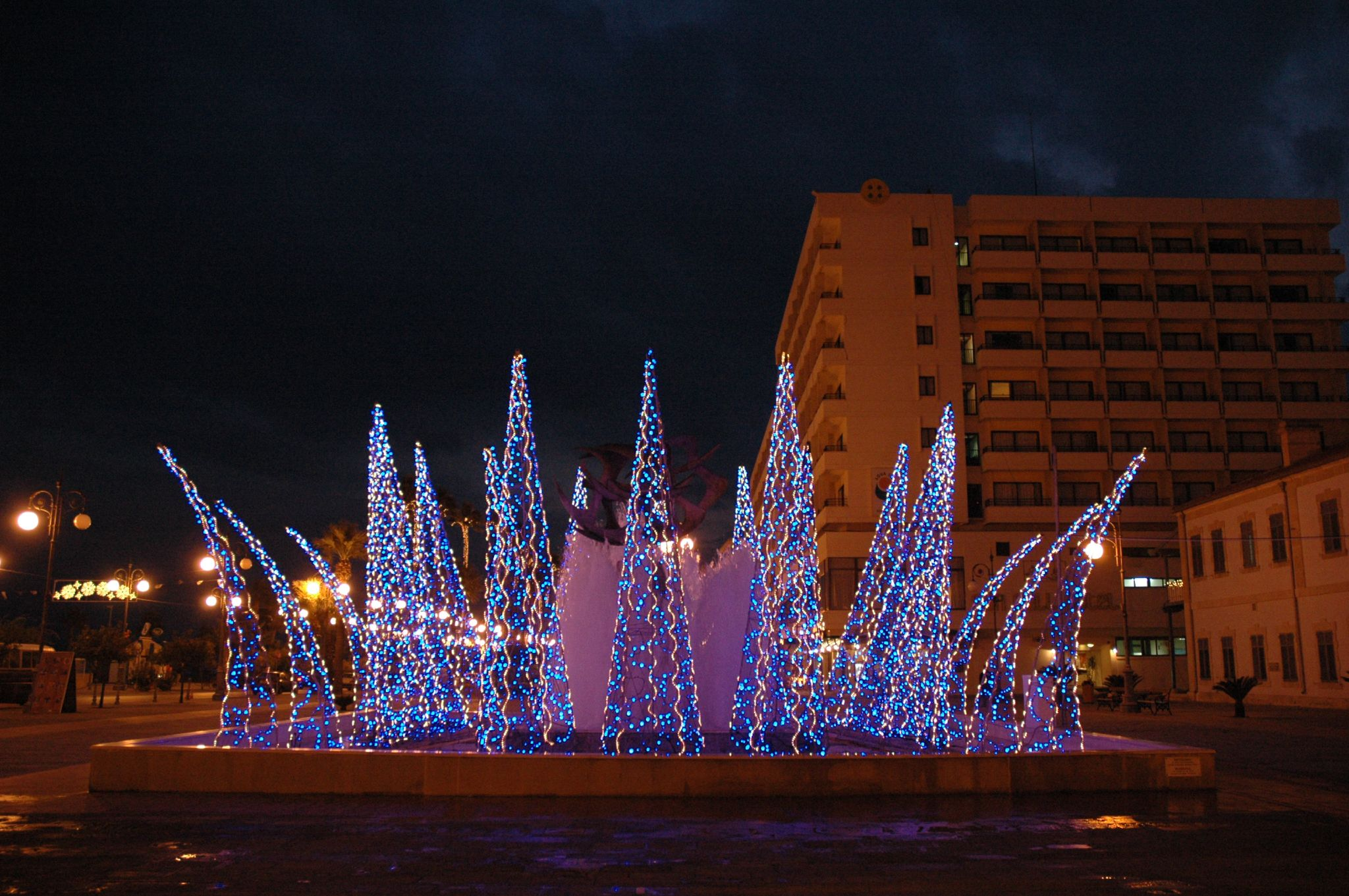 Cipro fontana di luci